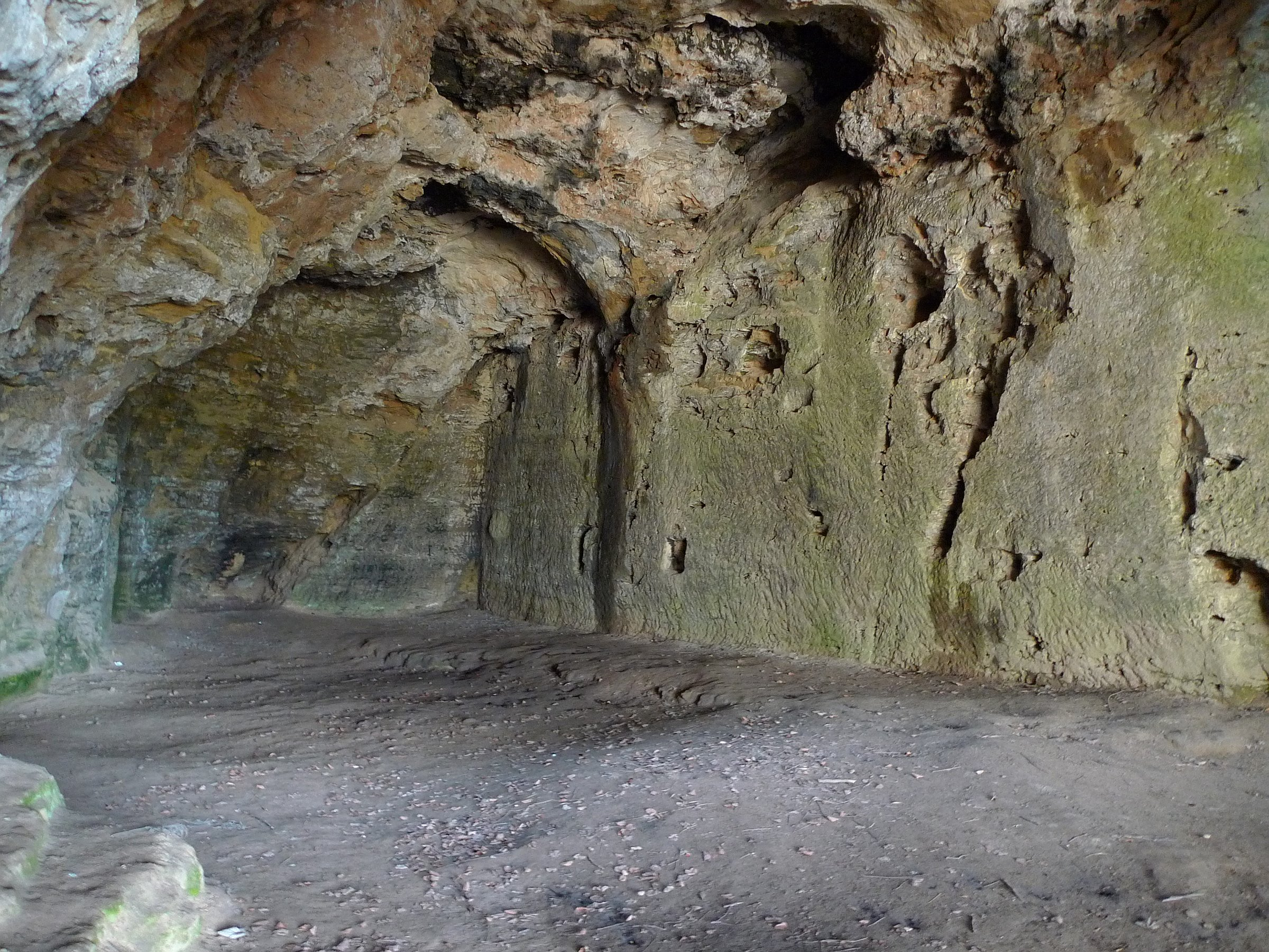 Das Innere der Steinkirche